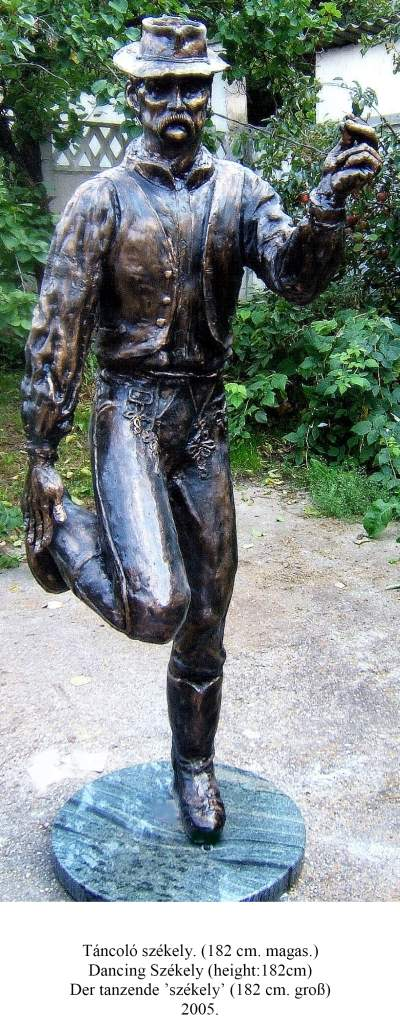 Táncoló székely, magasság: 182 cm; Csíky László szobra